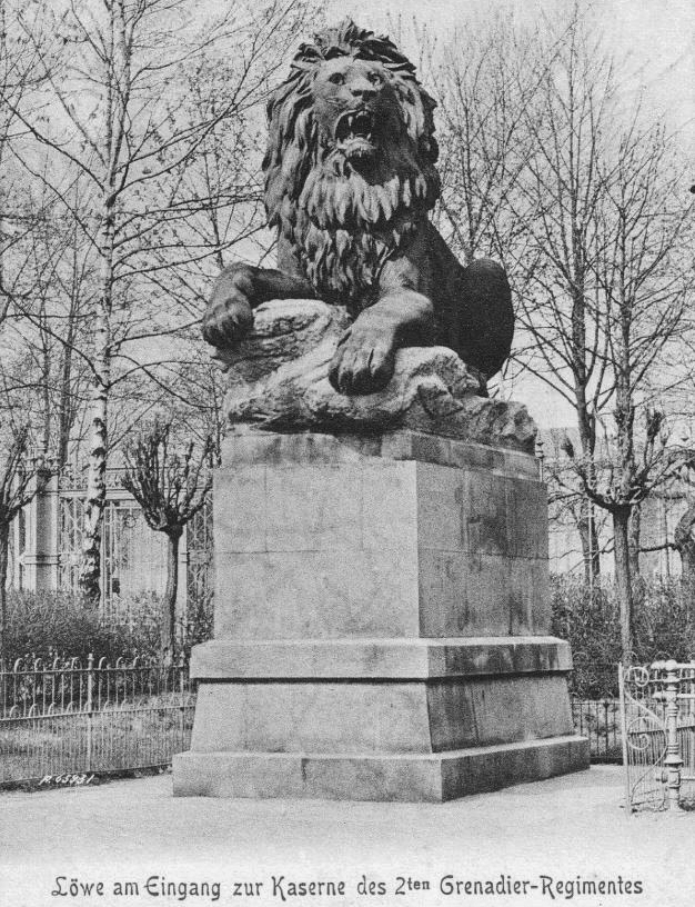 León.